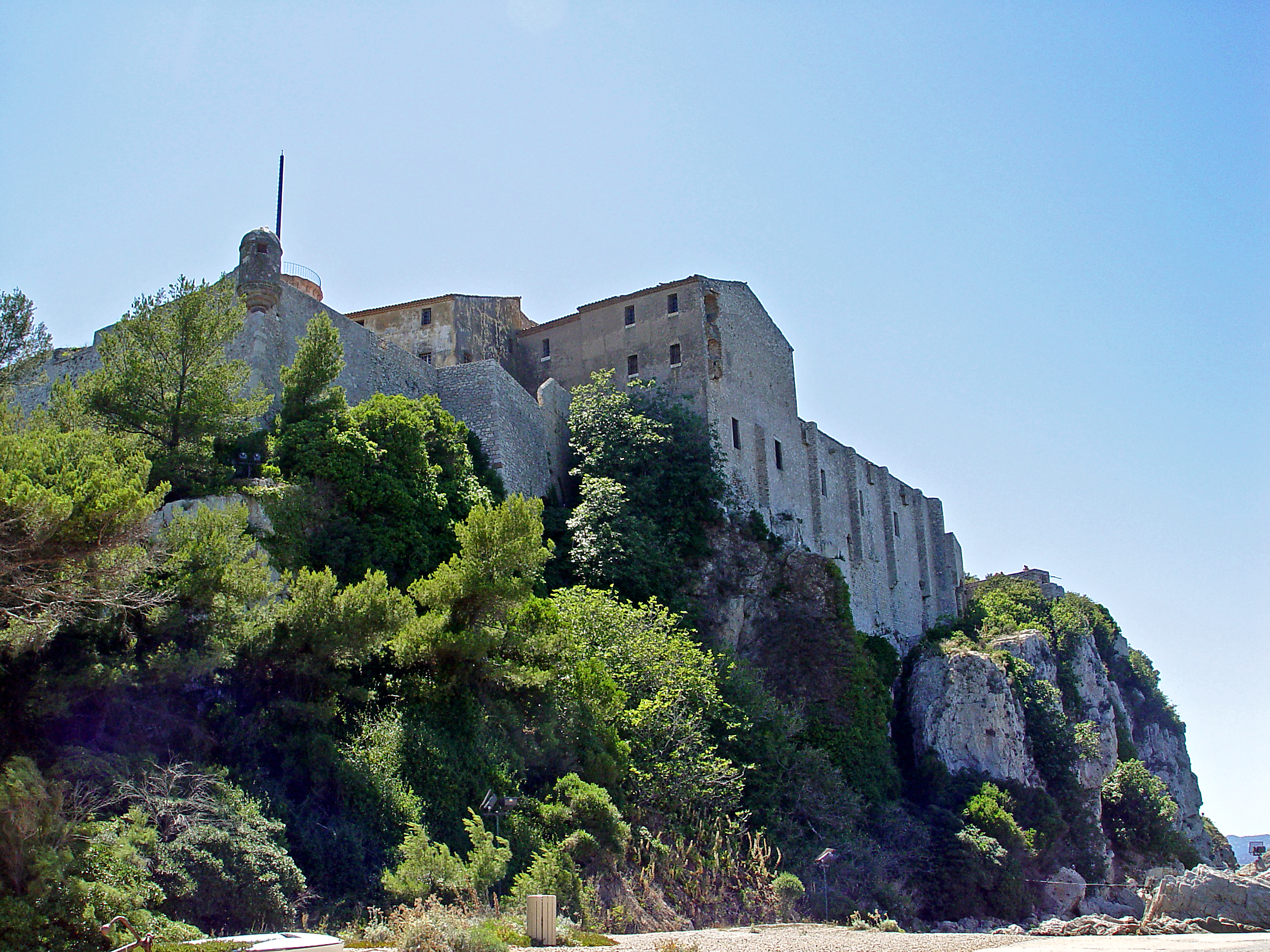 Fort Royal auf der Insel Sainte-Marguerita mit dem Gefängnis der Eisernen Maske